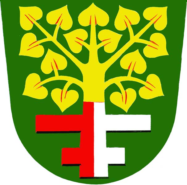 Znak obce Braníškov